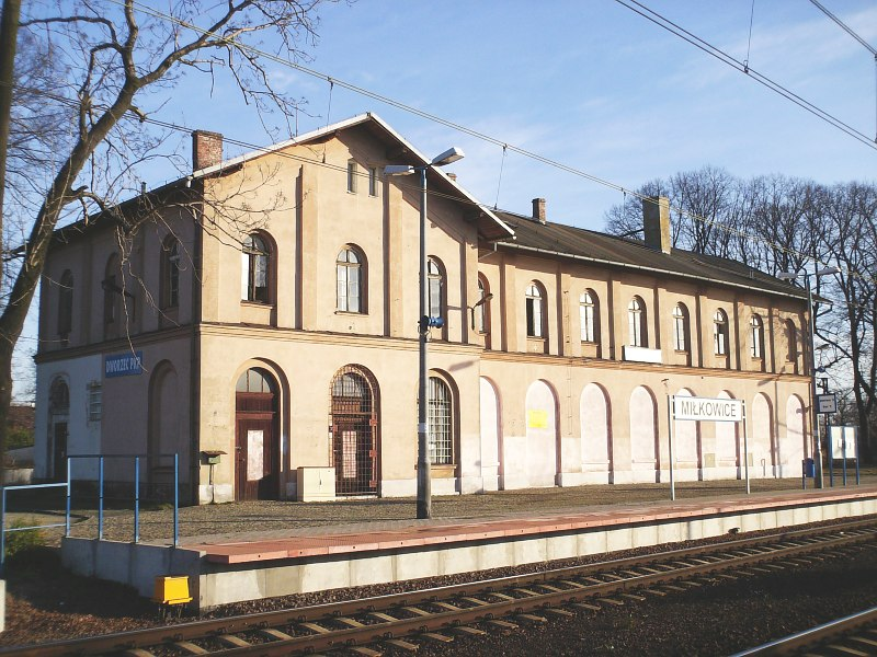 Miłkowice, ul. II Armii Wojska Polskiego 1 - dworzec kolejowy, kon. XIX